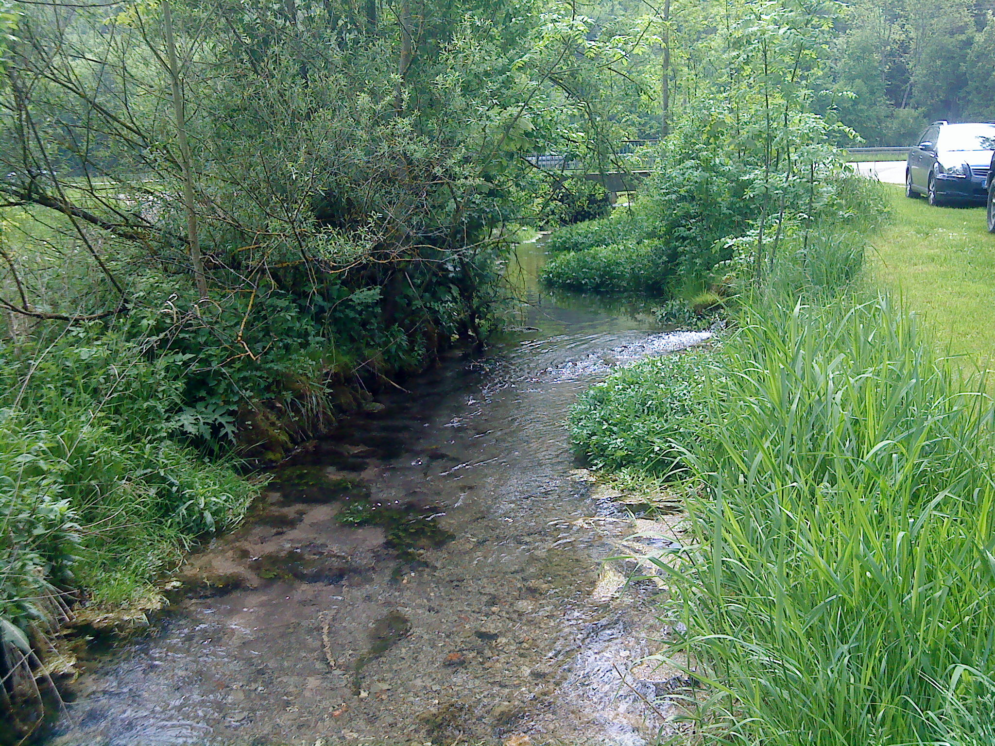 Abfließender Bach des Blaubrunnens bei Altdorf